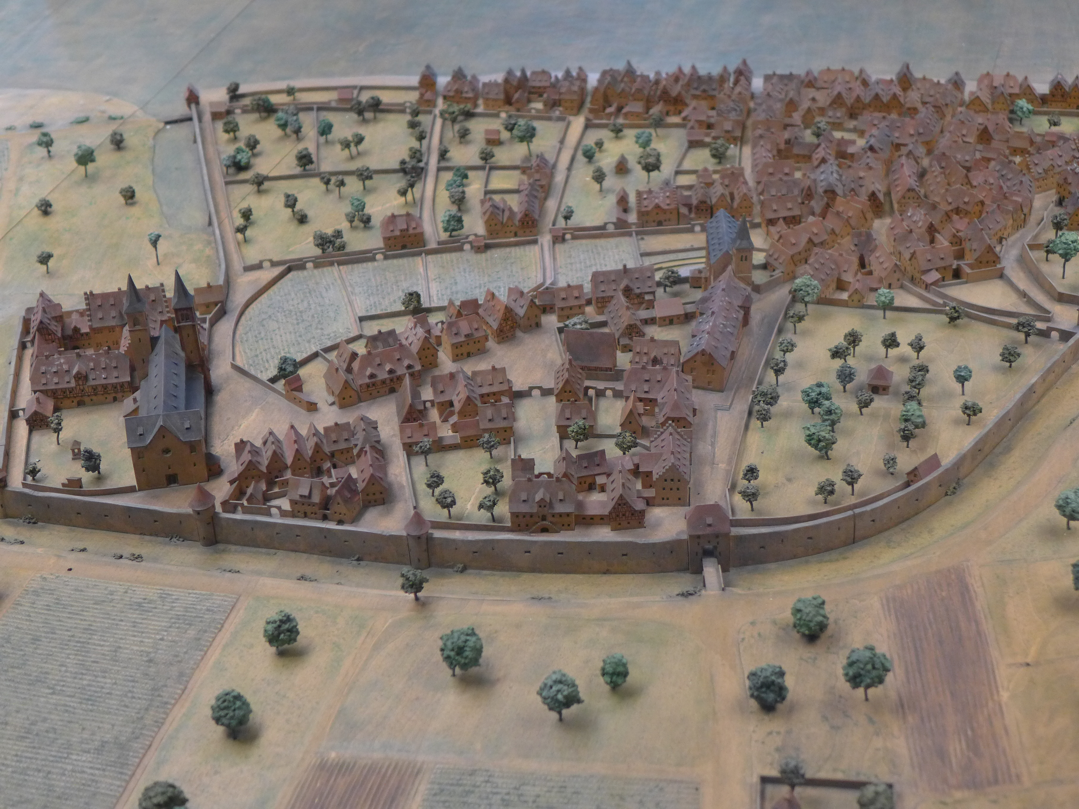 Modell des Würzburger Schottenklosters (links) und der Würzburger Deutschhauskirche (rechts) um das Jahr 1525 (Konzeption Franz Serberich, Ausführung Georg Achatz u. Karl Steinbauer, 1953-1967, Lindenholz, Maßstab 1:500, Fürstenbaumuseum Würzburg)